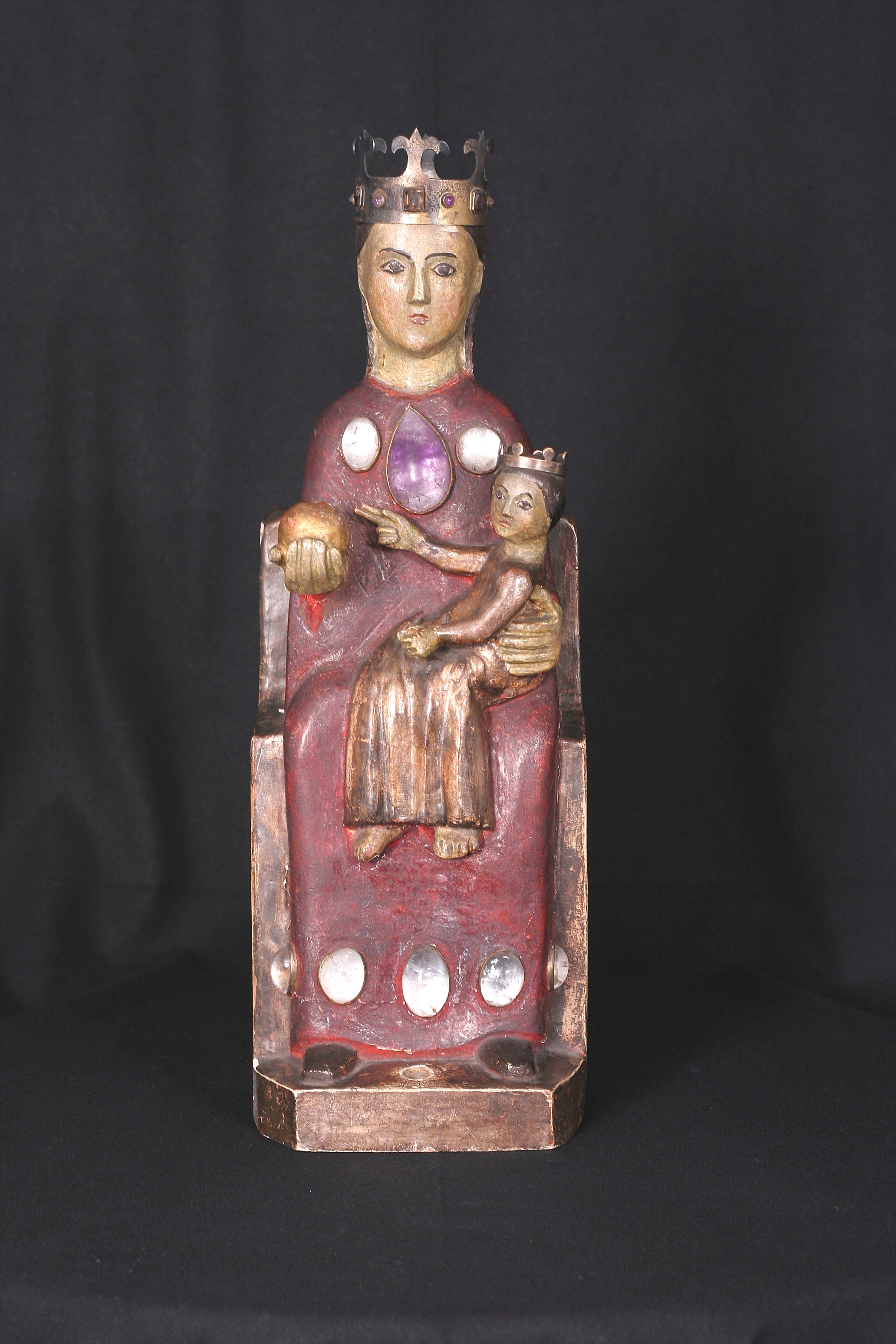 Das Gnadenbild in der St. Dionysiuskirche in Bökenförde